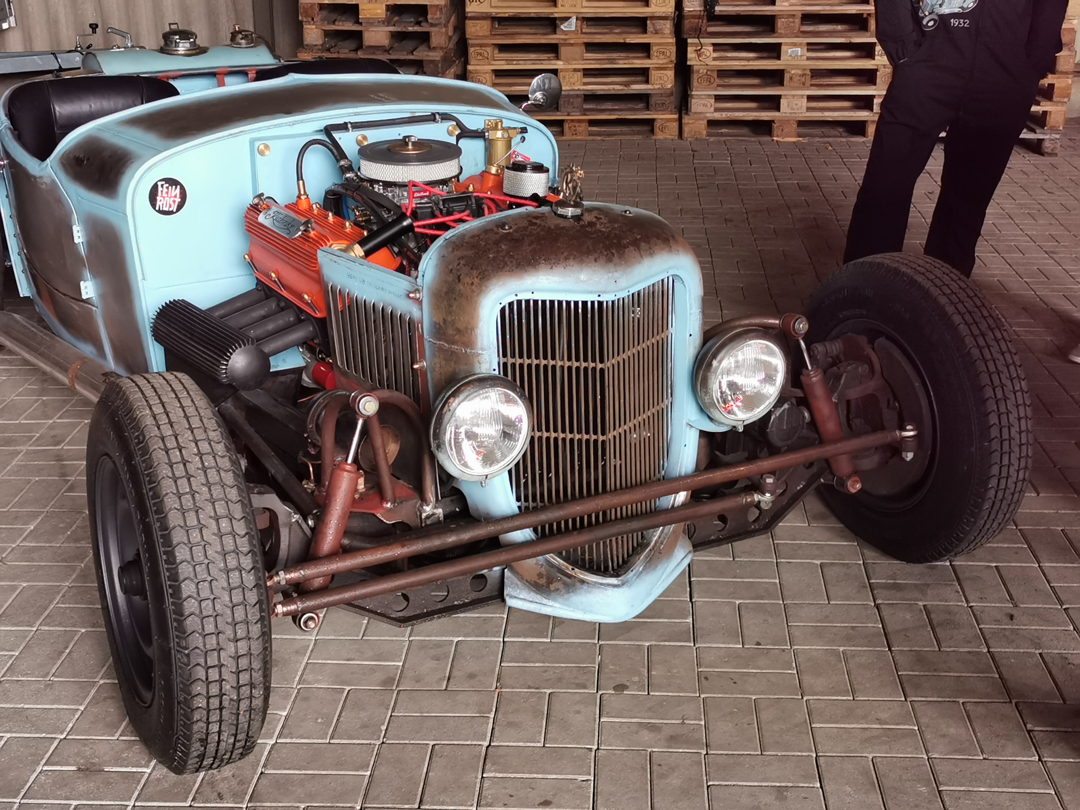 Restaurierter Prototyp fotografiert bei der Pressekonferenz zum Werner Rennen 2019